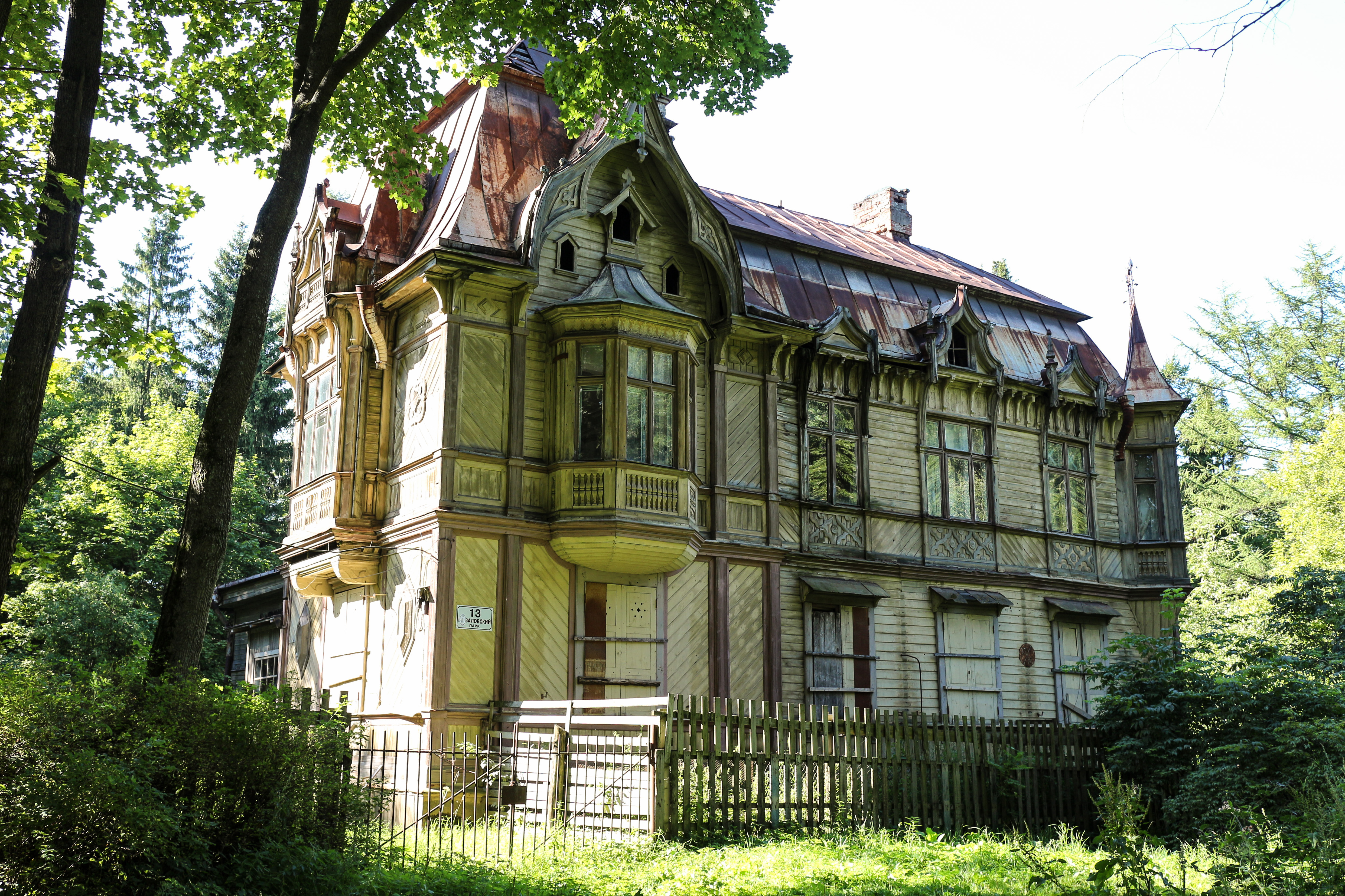 Шуваловский парк